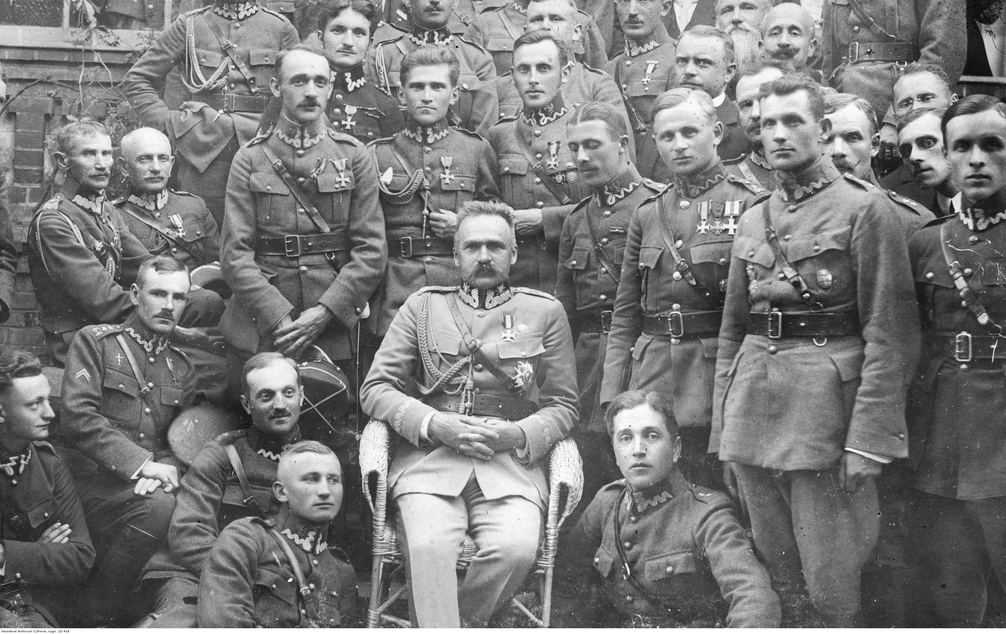 Marszałek Józef Piłsudski w otoczeniu żołnierzy i oficerów 64 Grudządzkiego Pułku Piechoty. Widoczny m.in. dowódca 16 Pomorskiej Dywizji Piechoty gen. Kazimierz Ładoś (siedzi w II rzędzie, 2. z lewej).